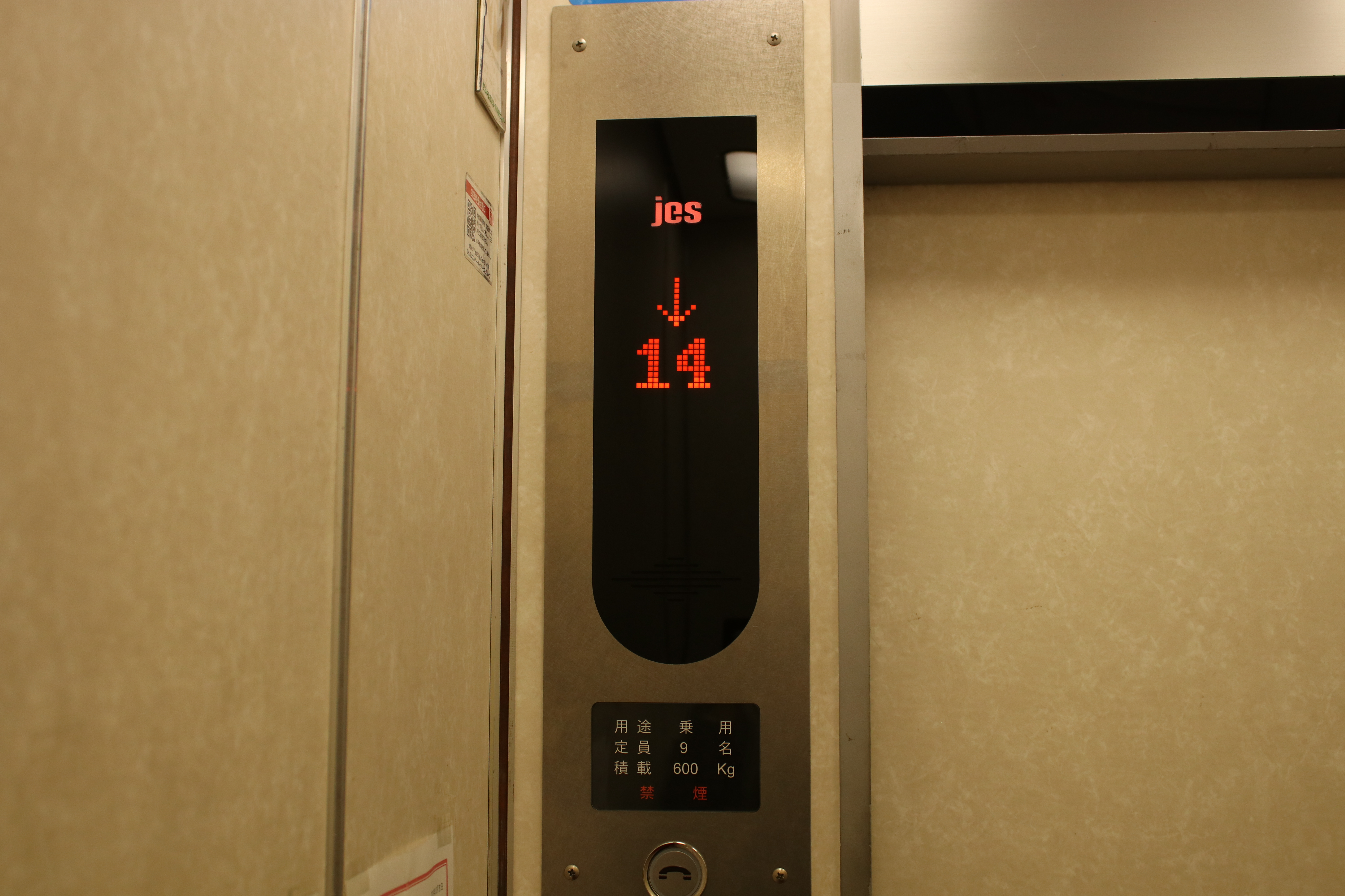 jesのロゴが入っています。